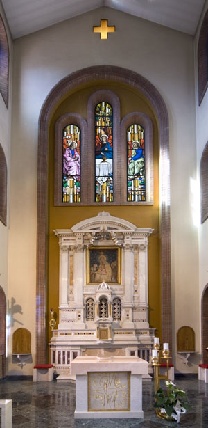 Interno della chiesa delle Carmelitane Scalze di Parma; sopra l'altare principale è collocato l'affresco di Santa Maria Bianca